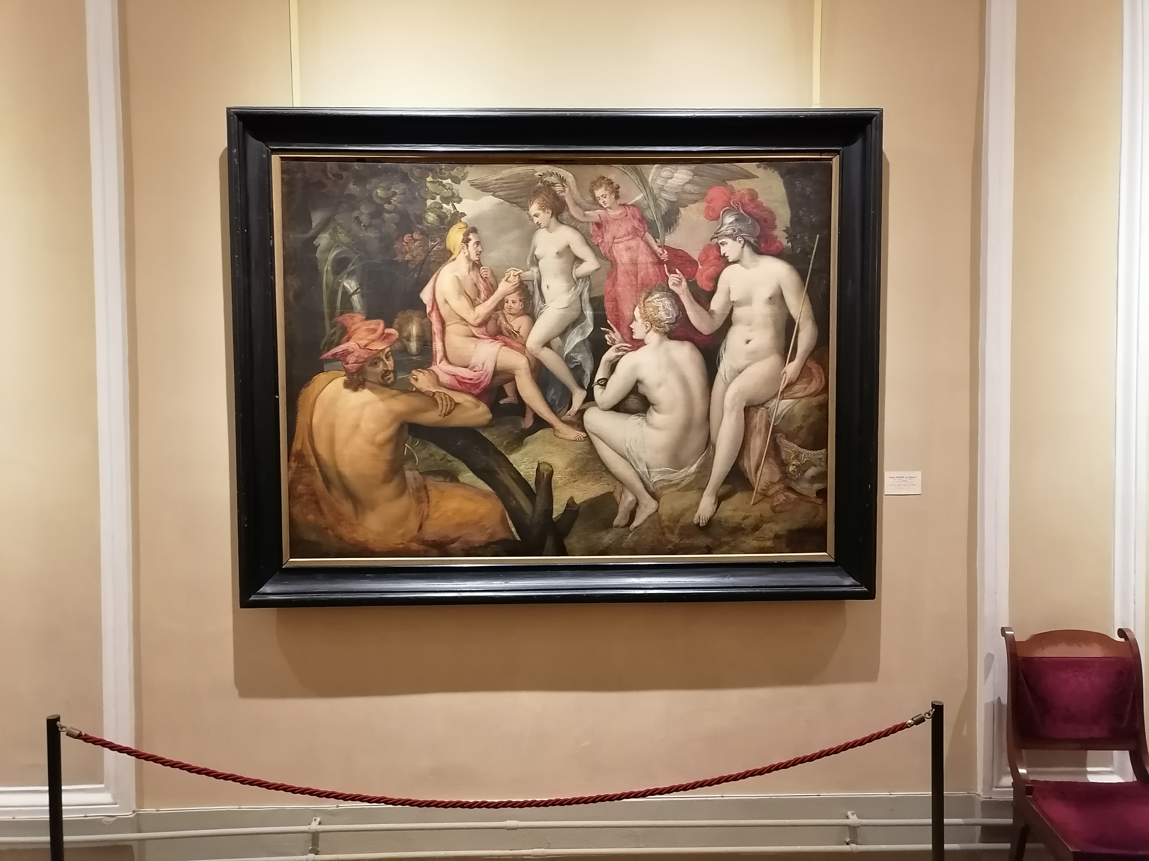 Малый Эрмитаж - зал 262